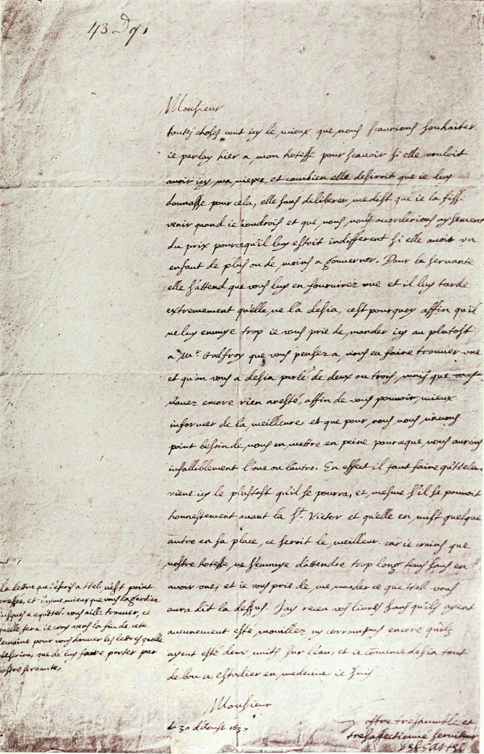 Transcription from Epistolarium : Monsieur, Toutes choses vont ici le mieux que nous saurions souhaiter. Je parlai hier à mon hôtesse pour savoir si elle voulait avoir ici ma nièce, et combien elle désirait que je lui donnasse pour cela; elle, sans délibérer, me dit que je la fisse venir quand je voudrais, et que nous nous accorderions aisément du prix, parce qu'il lui était indifférent si elle avait un enfant de plus ou de moins à gouverner. Pour la servante, elle s'attend que vous lui en fournirez une, et il lui tarde extrêmement qu'elle ne l'a déjà; c'est pourquoi, afin qu'il ne lui ennuie trop, je vous prie de mander ici au plus tôt à M. Godfroy, que vous pensez à nous en faire trouver une et qu'on vous a déjà parlé de deux ou trois, mais que vous n'avez encore rien arrêté, afin de vous pouvoir mieux informer de la meilleure, et que, pour nous, nous n'avons point besoin de nous en mettre en peine, parce que nous aurons infailliblement l'une ou l'autre. En effet, il faut faire qu'Hélène vienne ici le plus tôt qu'il se pourra; et même, s'il se pouvait honnêtement avant la Saint-Victor et qu'elle en mît quelque autre en sa place, ce serait le meilleur. Car je crains que notre hôtesse ne s'ennuie d'attendre trop longtemps sans en avoir une, et je vous prie de me mander ce que Hel. vous aura dit là-dessus. J'ai reçu vos livres sans qu'ils aient aucunement été mouillés ni corrompus, encore qu'ils aient été deux nuits sur l'eau, et je commence déjà tout de bon à étudier en Médecine. Je suis, Monsieur, Votre très humble et très affectionné serviteur, Descartes. Du 30 d'Août 1637. [En marge, vers la fin.] La lettre que j'écris à Hel. n'est point pressée, et j'aime mieux que vous la gardiez jusques à ce qu'Hel. vous aille trouver, ce qu'elle fera, je crois, vers la fin de cette semaine, pour vous donner les lettres qu'elle m'écrira, que de lui faire porter par votre servante.